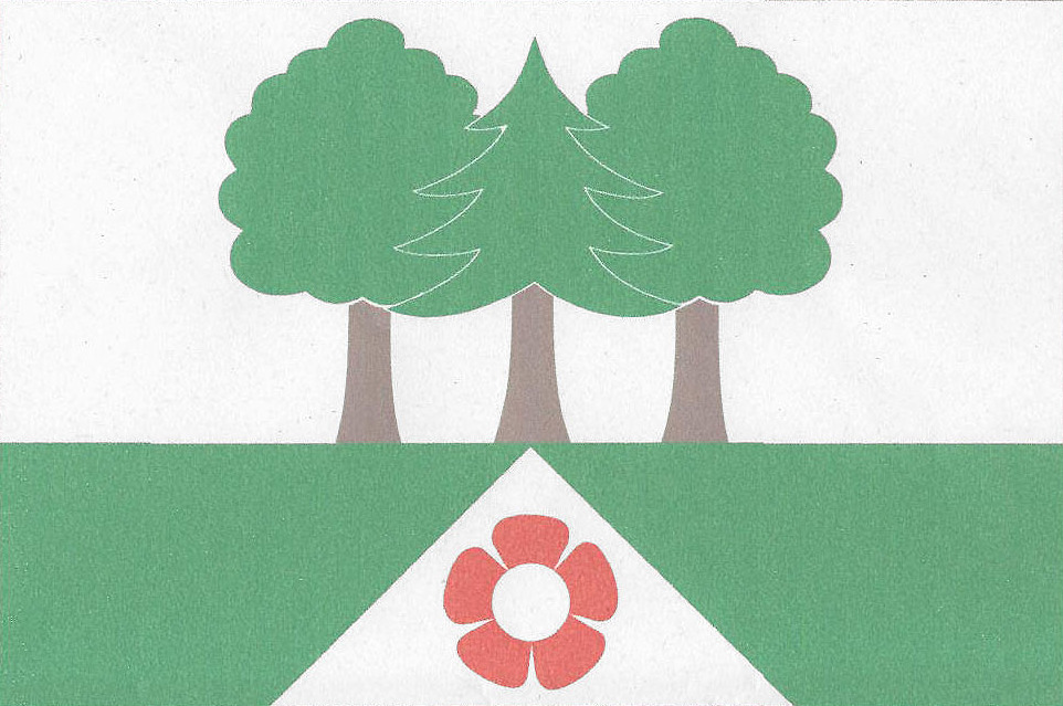 Vlajka obce Hvozdec